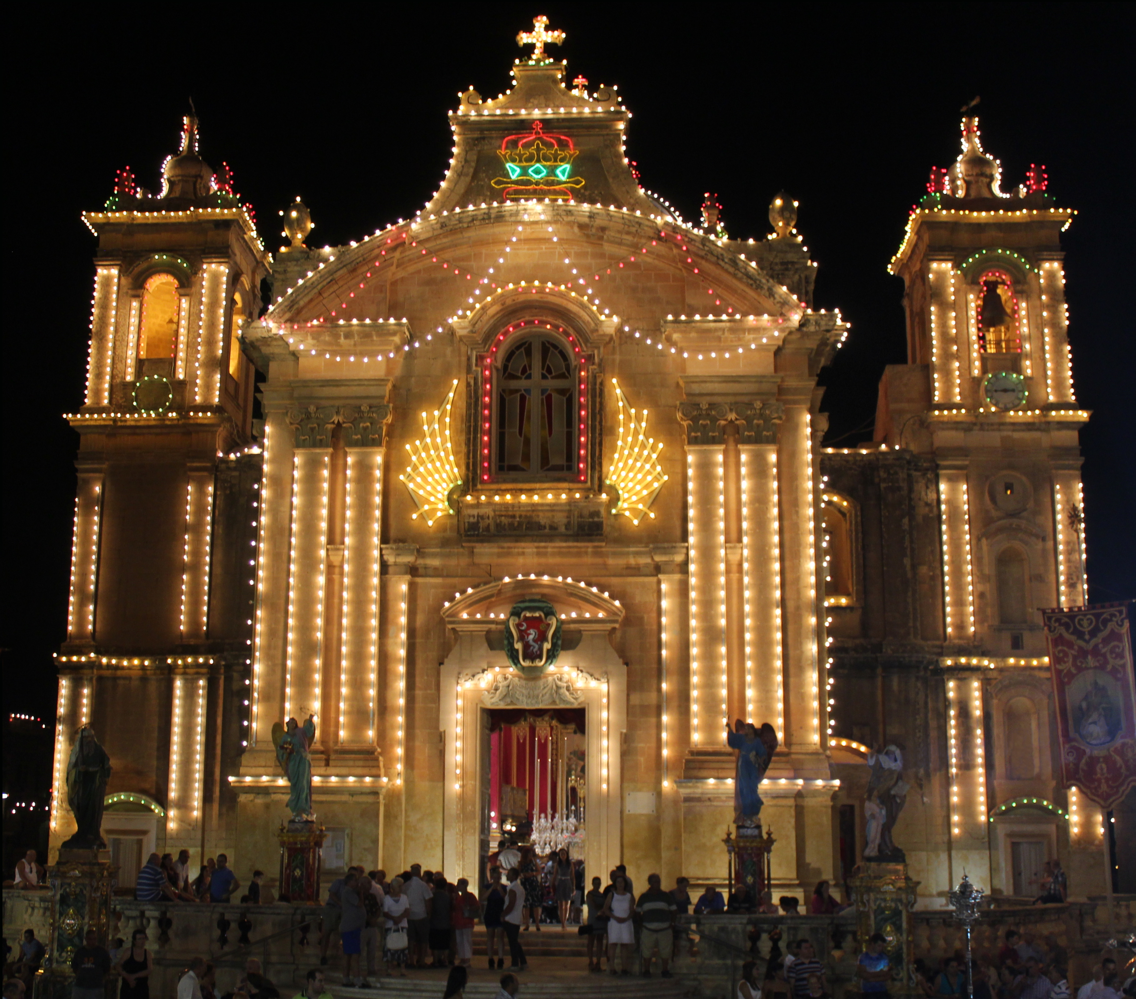 Parish Church of the Assumption, während des Patronatsfestes zu Maria Himmelfahrt. This media is about Maltese cultural property with inventory number 01778.